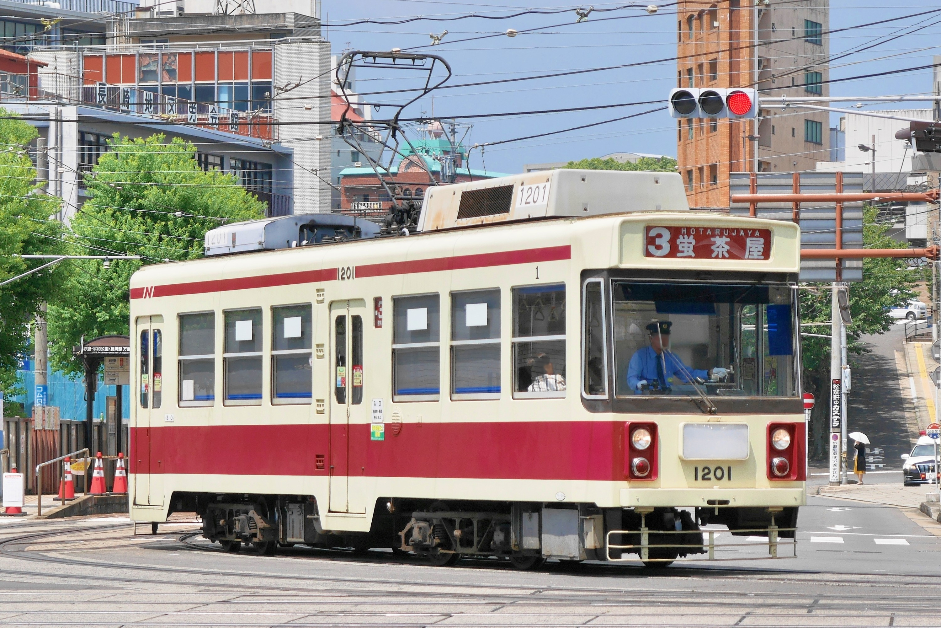 長崎電気軌道の路面電車1200形1201。